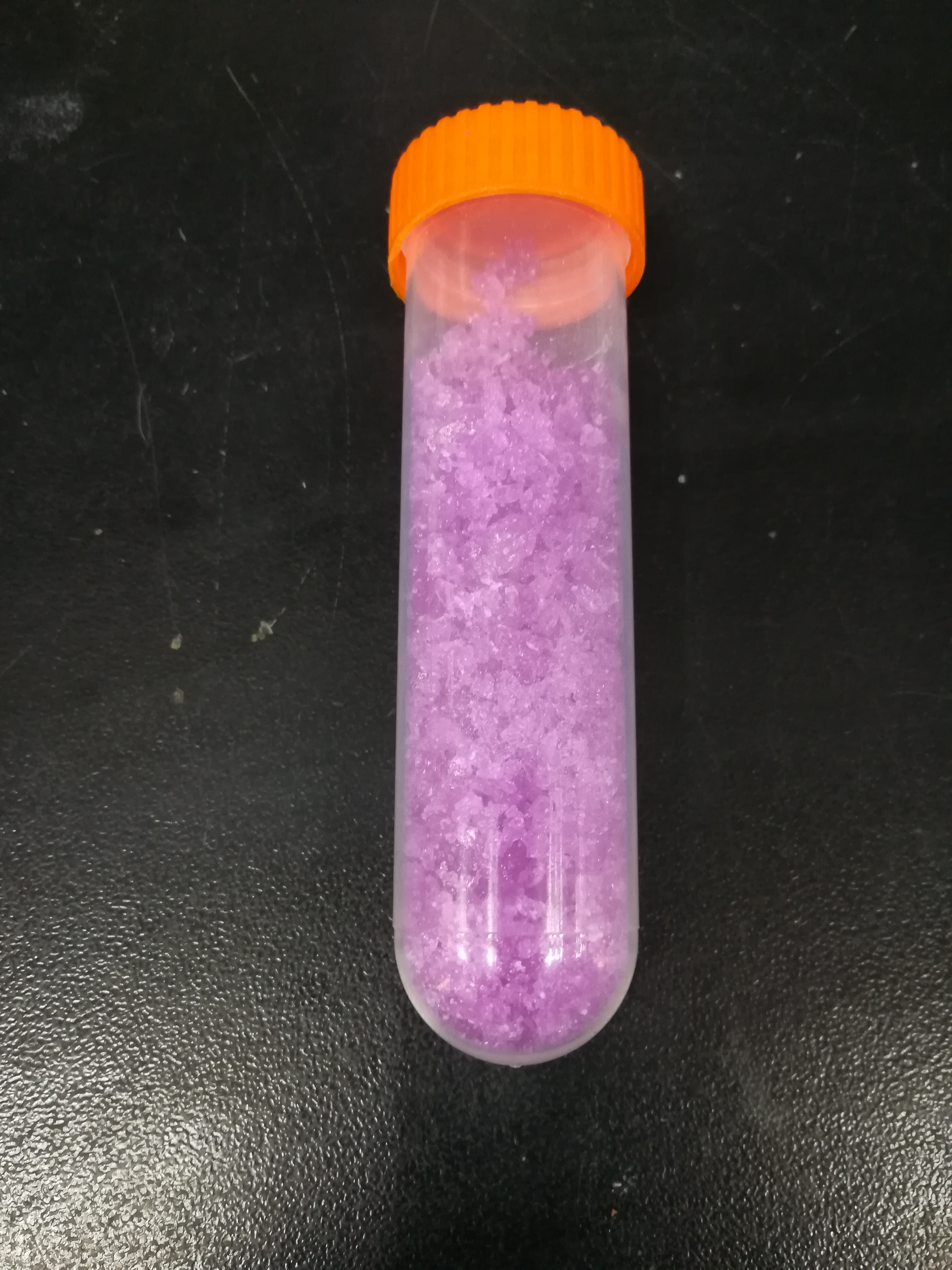 50g的硝酸钕